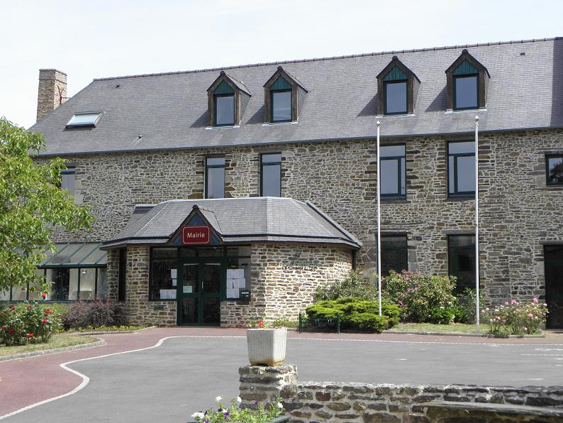 Mairie de Chanteloup (35).